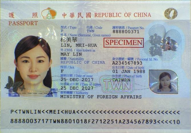 第二代中華民國晶片護照個人資料頁